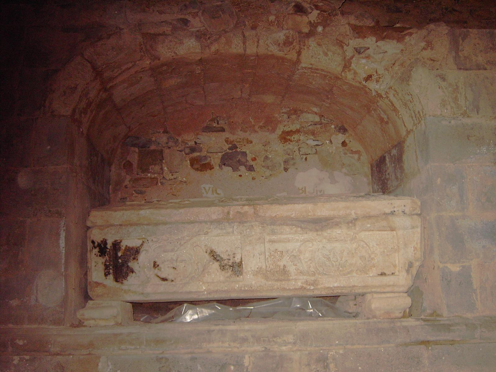 Un Sarcófago que se encuentra en un cuerpo lateral de la nave de la iglesia de San Victorián, en Huesca.